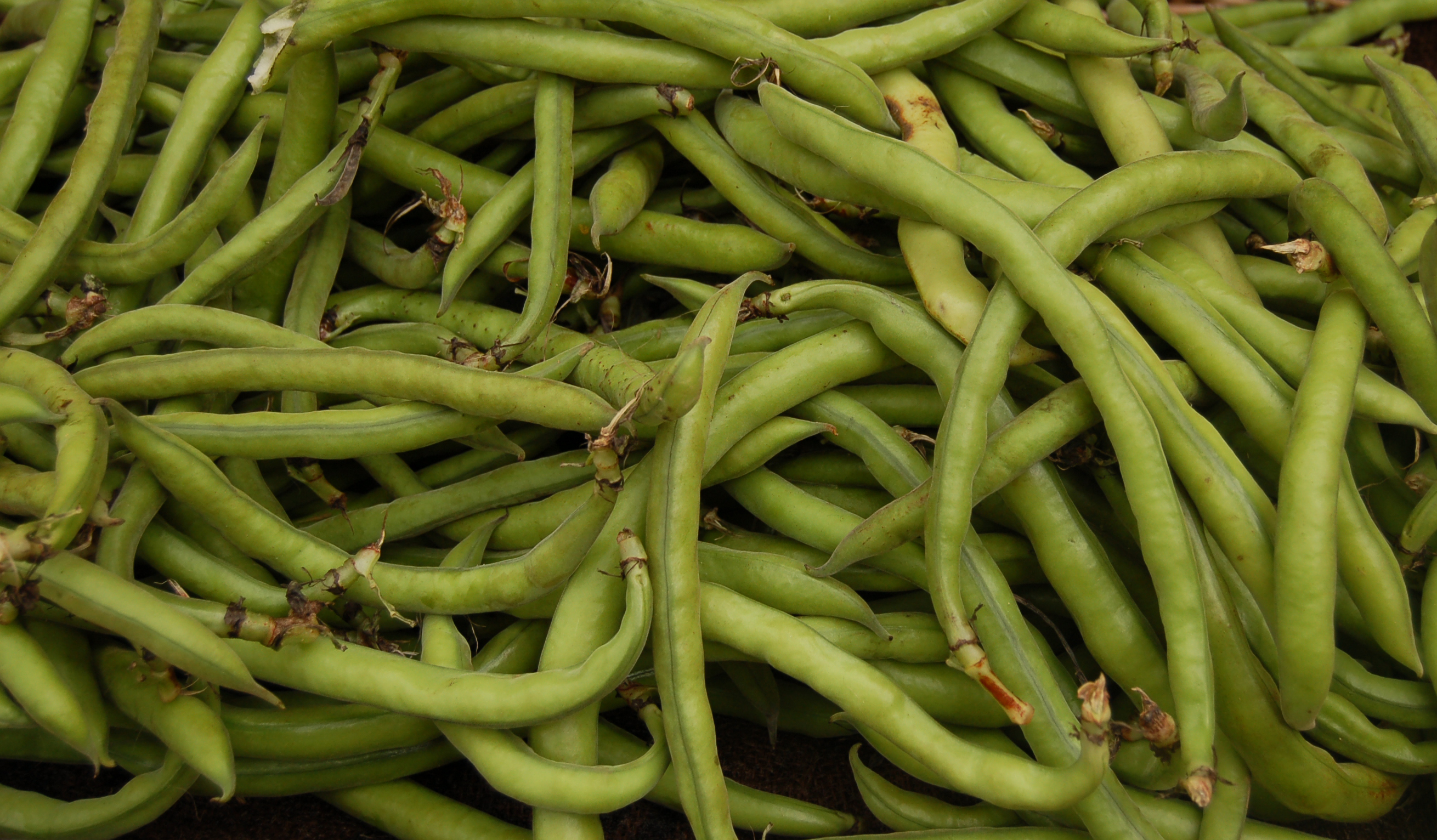 Fèves Prise à Toulon (France) Avril 2007